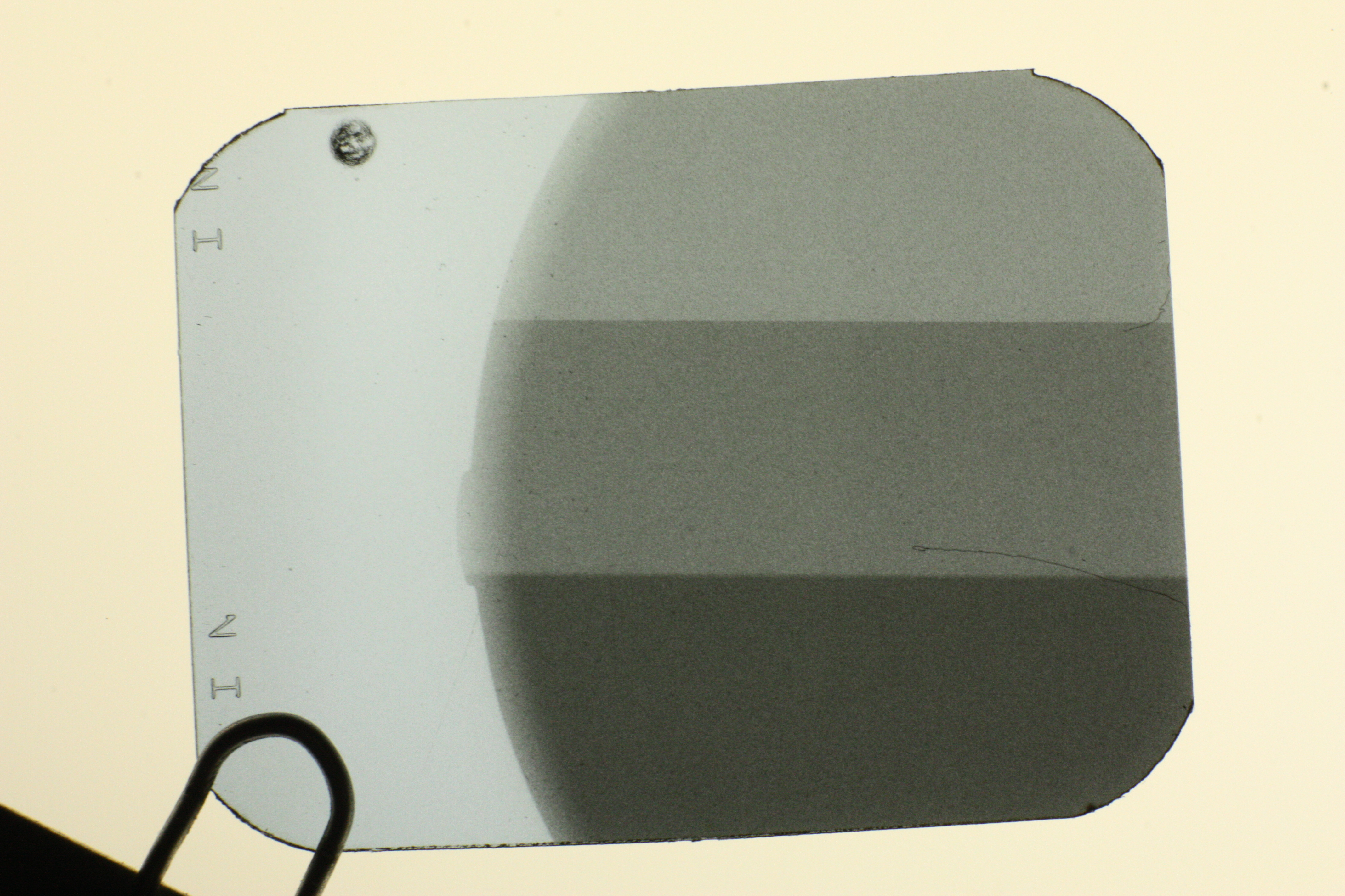 Zahnfilm Rö